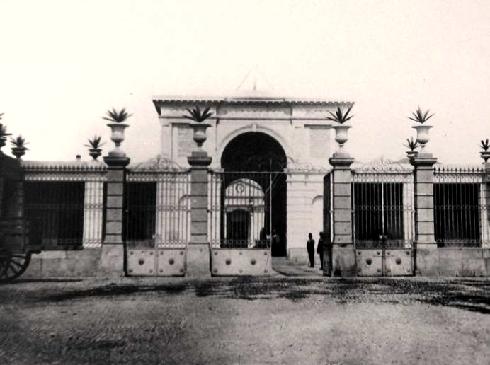 Fachada del Hospital Dos de Mayo, en Lima.